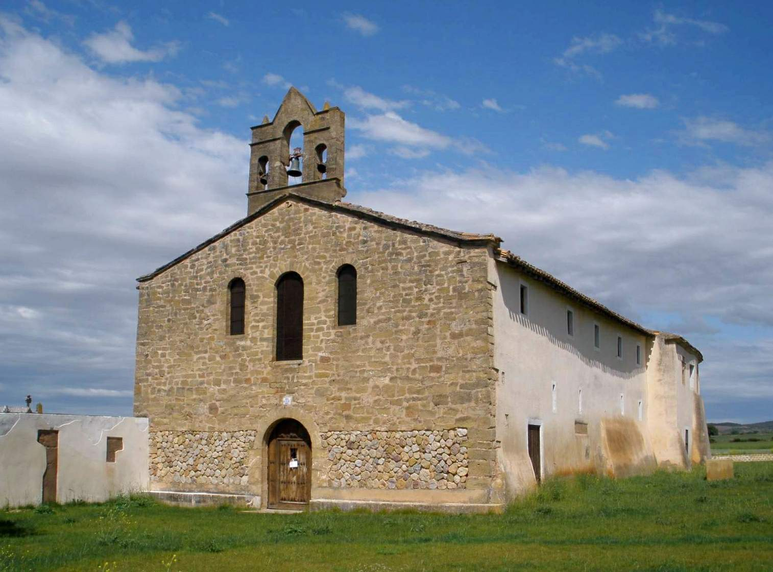 Basílica de Santa María de los Arcos, Tricio (La Rioja)